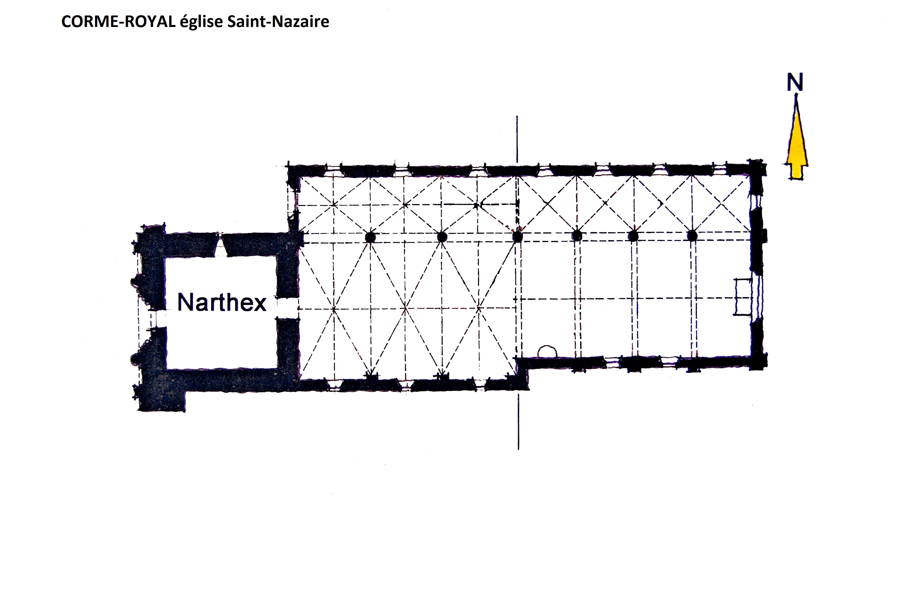 Corme-Royal église St Nazaire